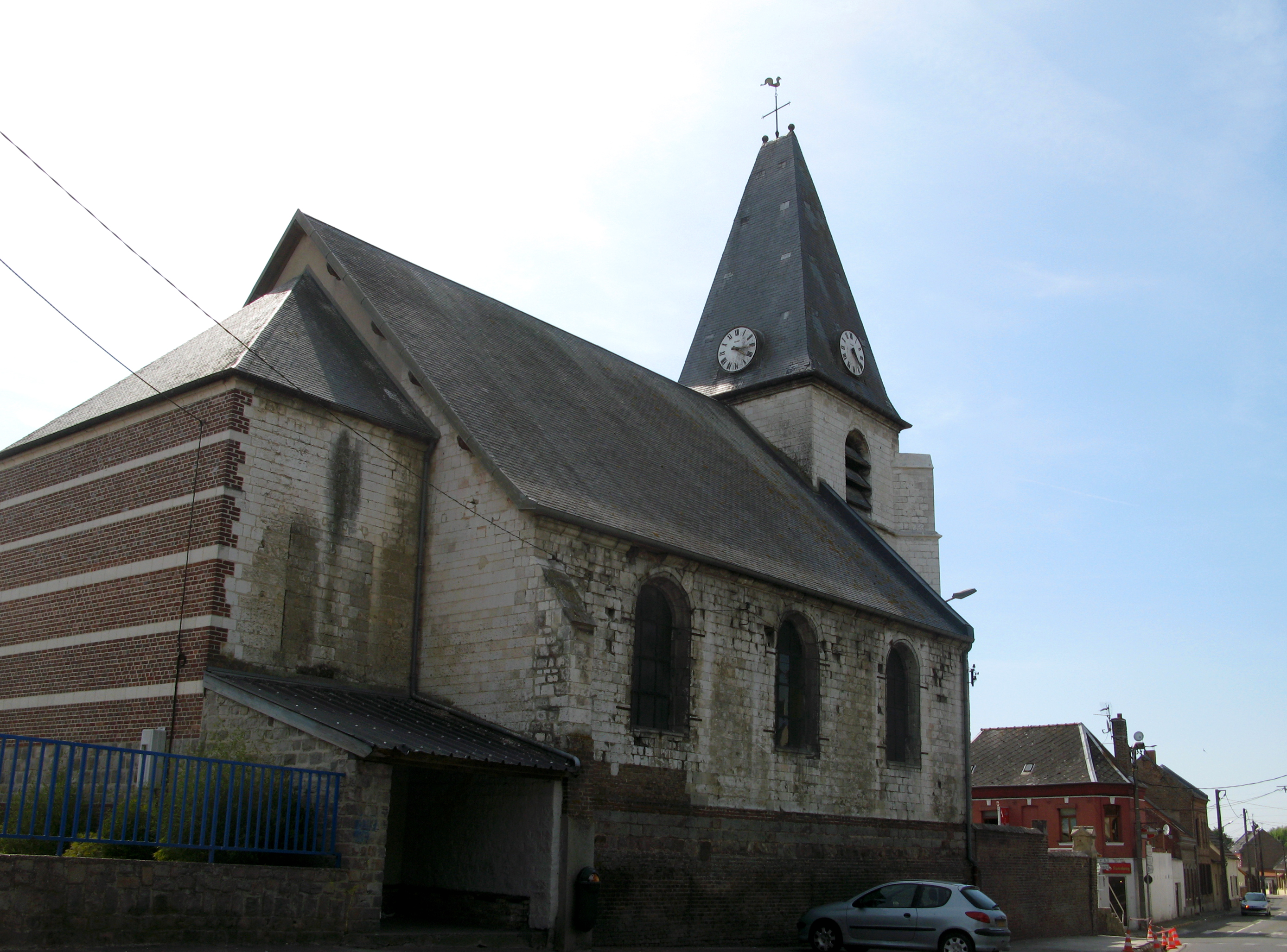 Saint-Sauveur (Somme, France) - L'église. Façade Nord de l'église, vue en arrivant d'Argœuves.